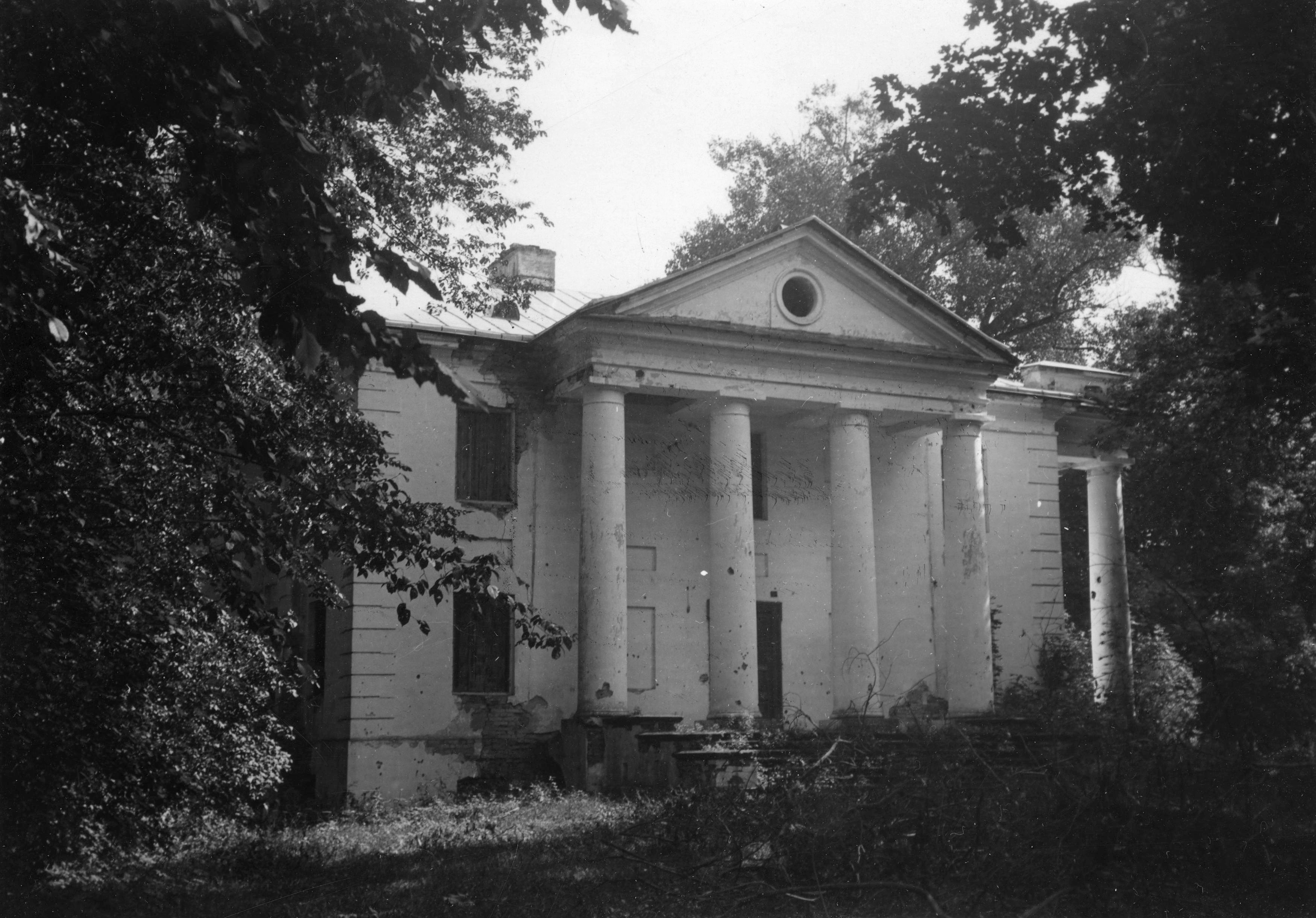 Беларуская (тарашкевіца): Дубровіца (Dubrovica), Варобін (Varobin). Сядзіба Плятэраў (Plater)